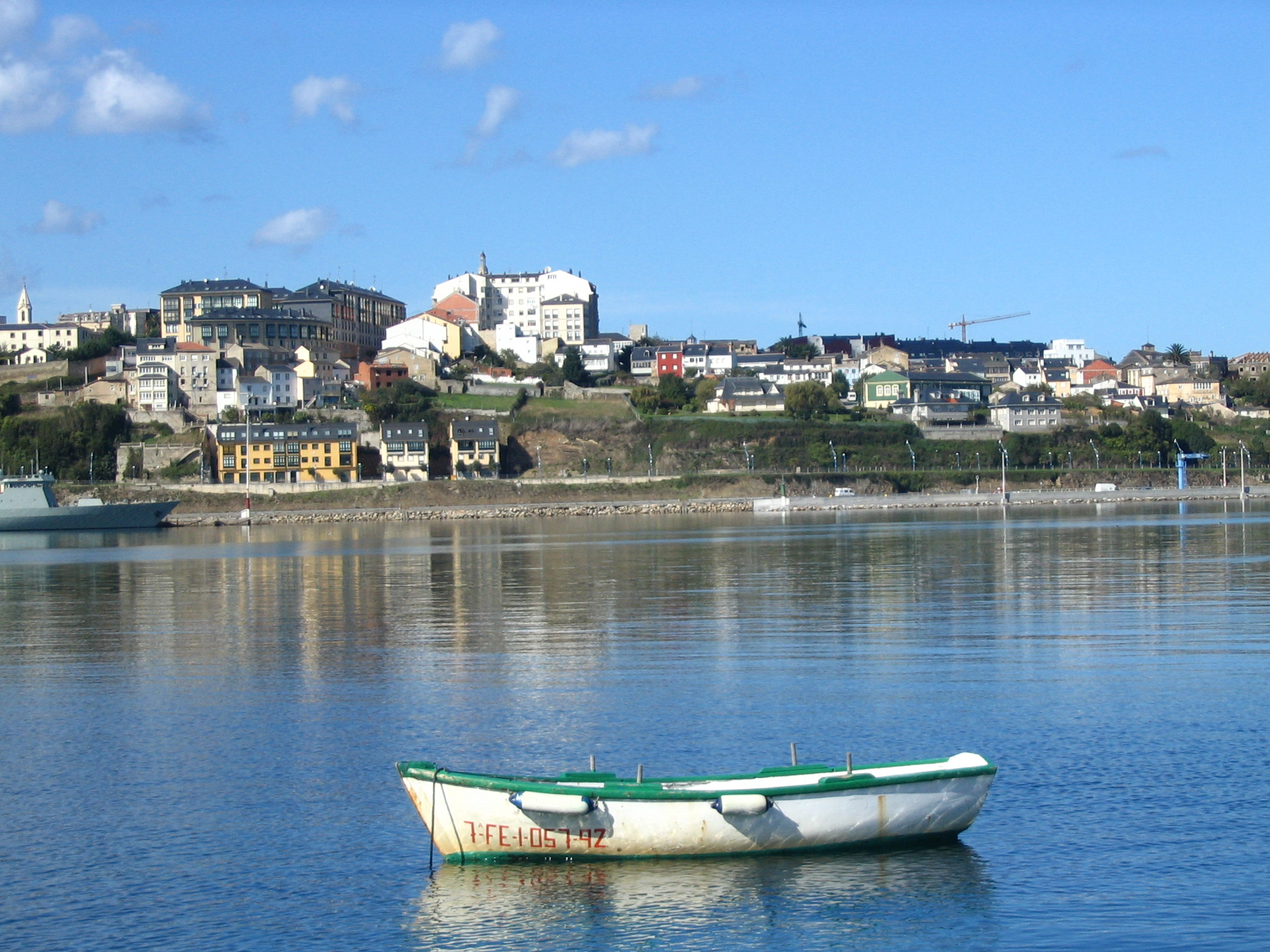 Ribadeo am Rio Eo